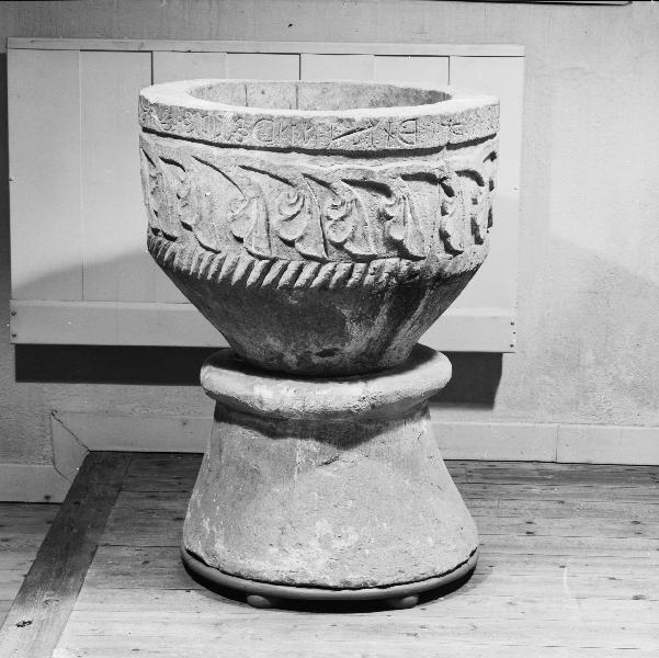 Dopfunt, sandsten, 1200-talet. Kategori: (04) DopfuntarDopfunt, sandsten, 1200-talet.